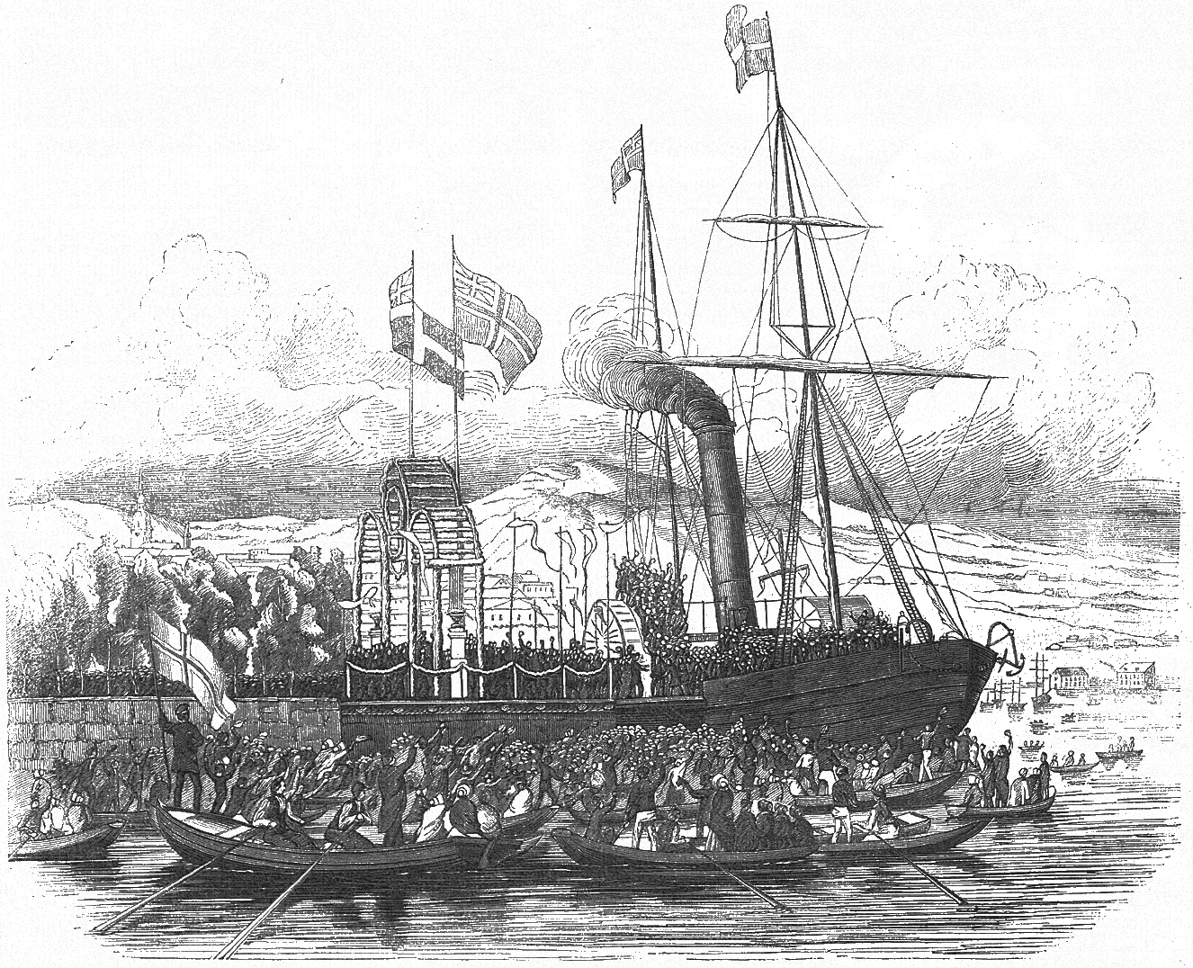 Uppsalastudentenes ankomst til studentermøtet i Christiania 23. juni 1852.